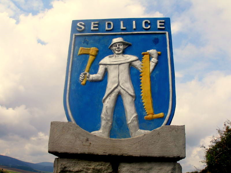 Obecný znak, obec Sedlice, okres Prešov. Slovensko.